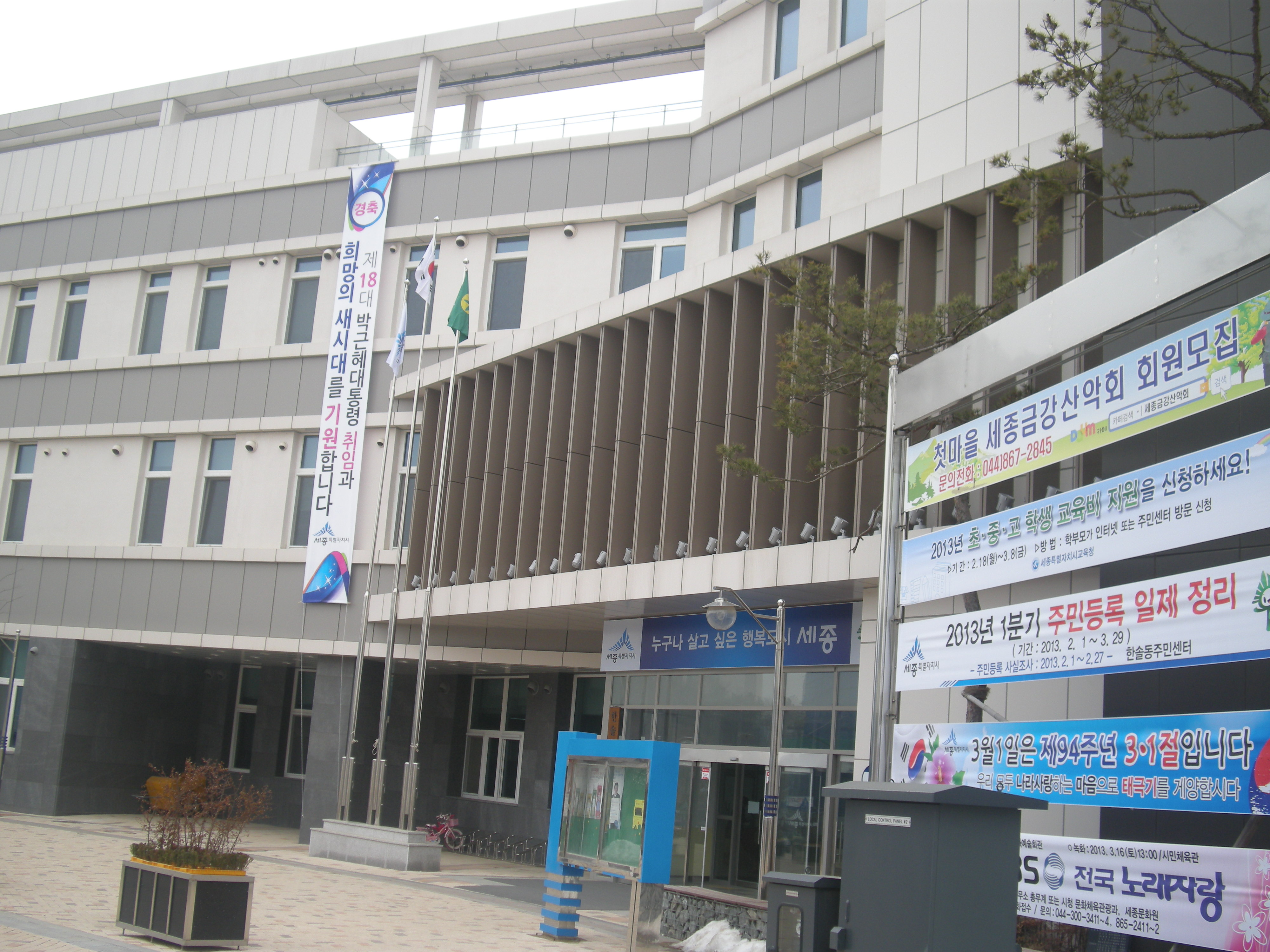 세종특별자치시 한솔동주민센터